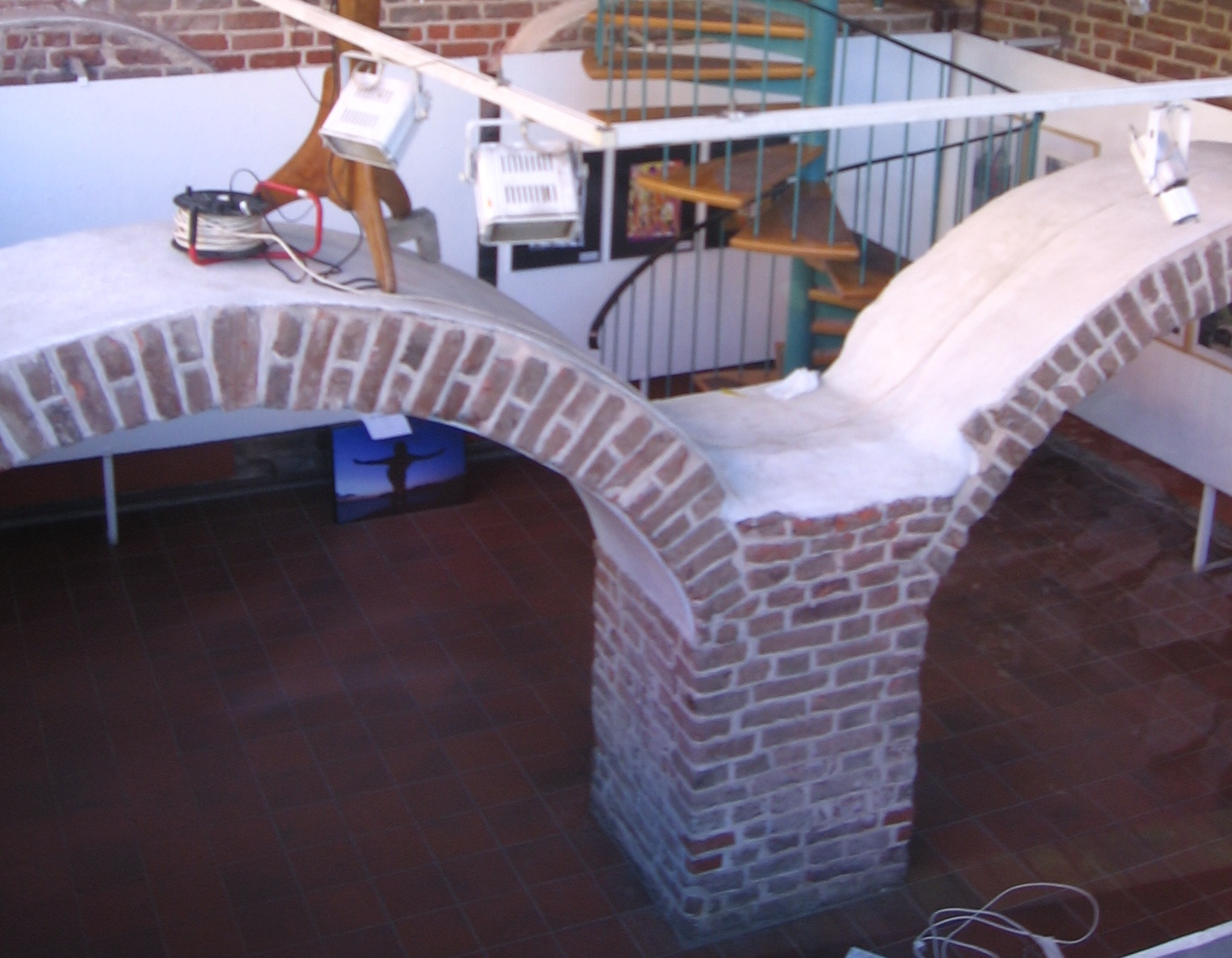 Domek Romański we Wrocławiu - widok dolnej kondygnacji